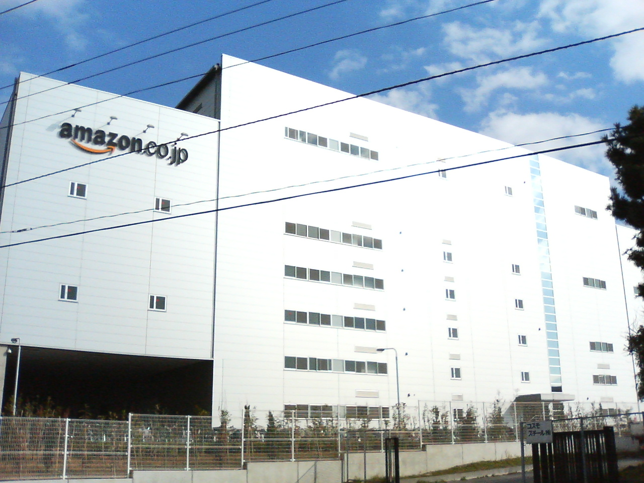 AmazonIchikawaFC